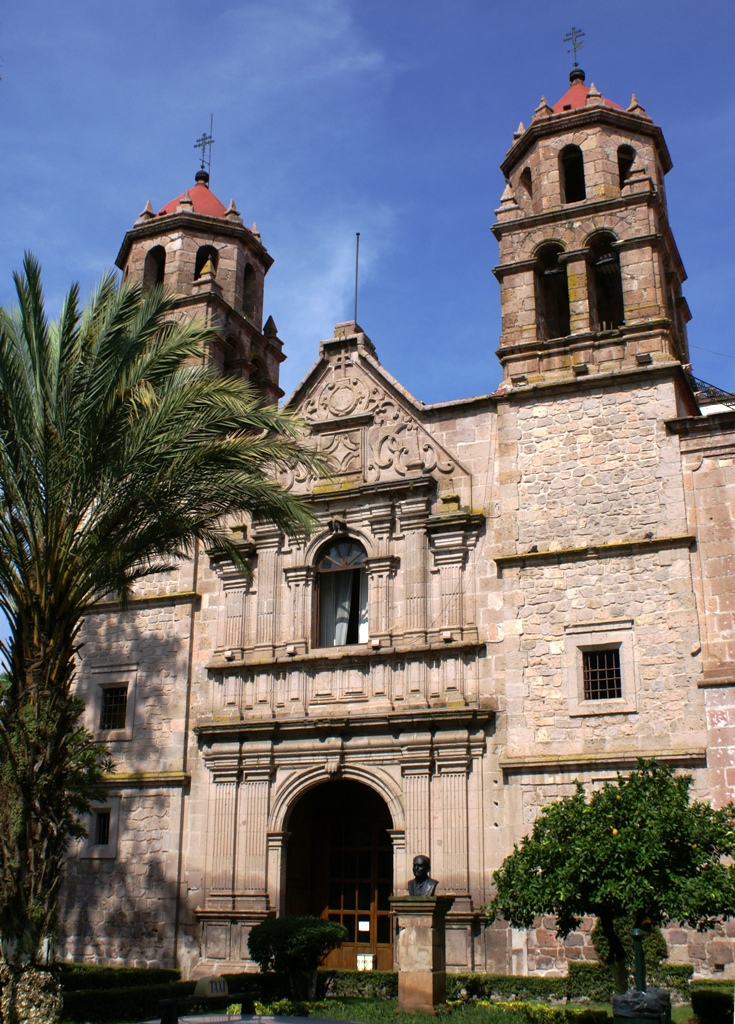 Biblioteca Pública de la Universidad Michoacana ubicada en Av. Madero Poniente esquina con Nigromante, Centro Histórico de Morelia, Michoacán, México. Fundada en 1930, conserva un fondo bibliográfico antiguo de 22,901 volúmenes, que van desde el siglo XV hasta principios del siglo XX. El edificio donde tiene su sede la biblioteca fue un templo de los Jesuitas durante la época del Virreinato de la Nueva España, construido en el siglo XVII en estilo barroco. En su interior la biblioteca conserva murales al fresco pintado a mediados del siglo XX por los artistas estadounidenses Hollis Howard Holbrook, S. C. Schoneberg y R. Hansen así como del mexicano Antonio Silva Díaz.